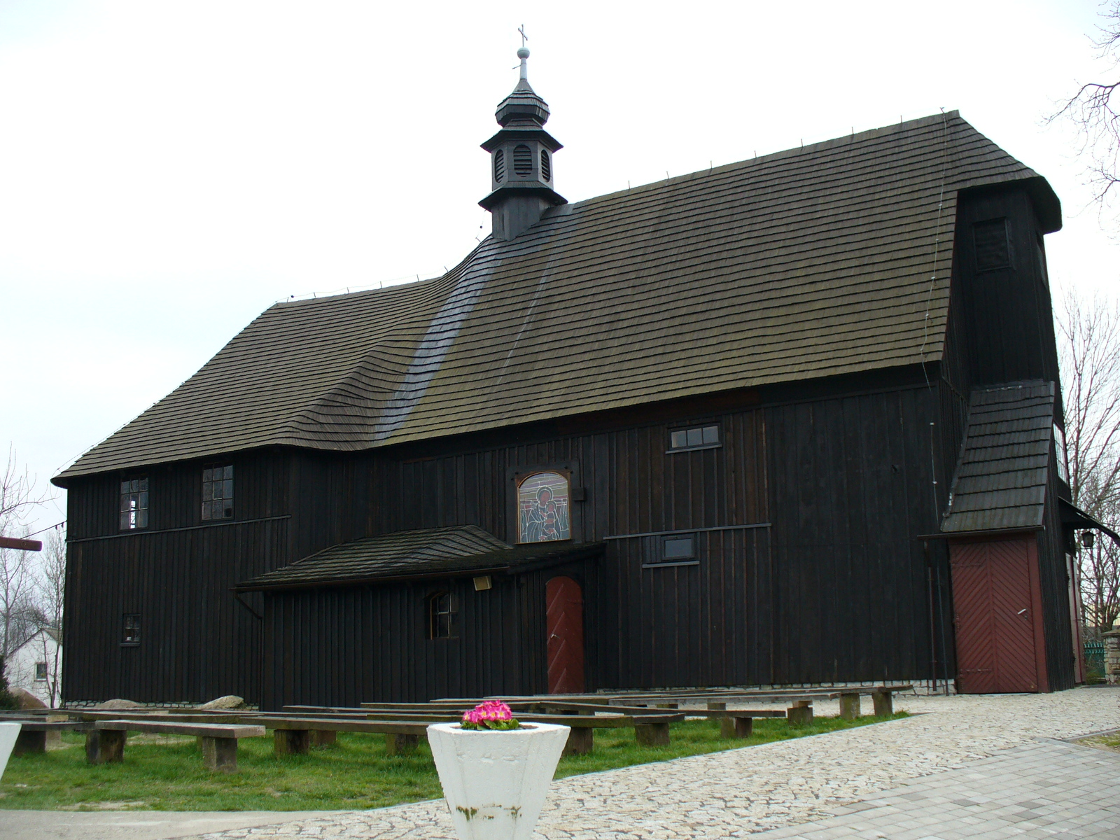 Kaltwasser - Holzkirche. Zimna Wódka - wooden church. Zimna Wódka - kościółek drewniany